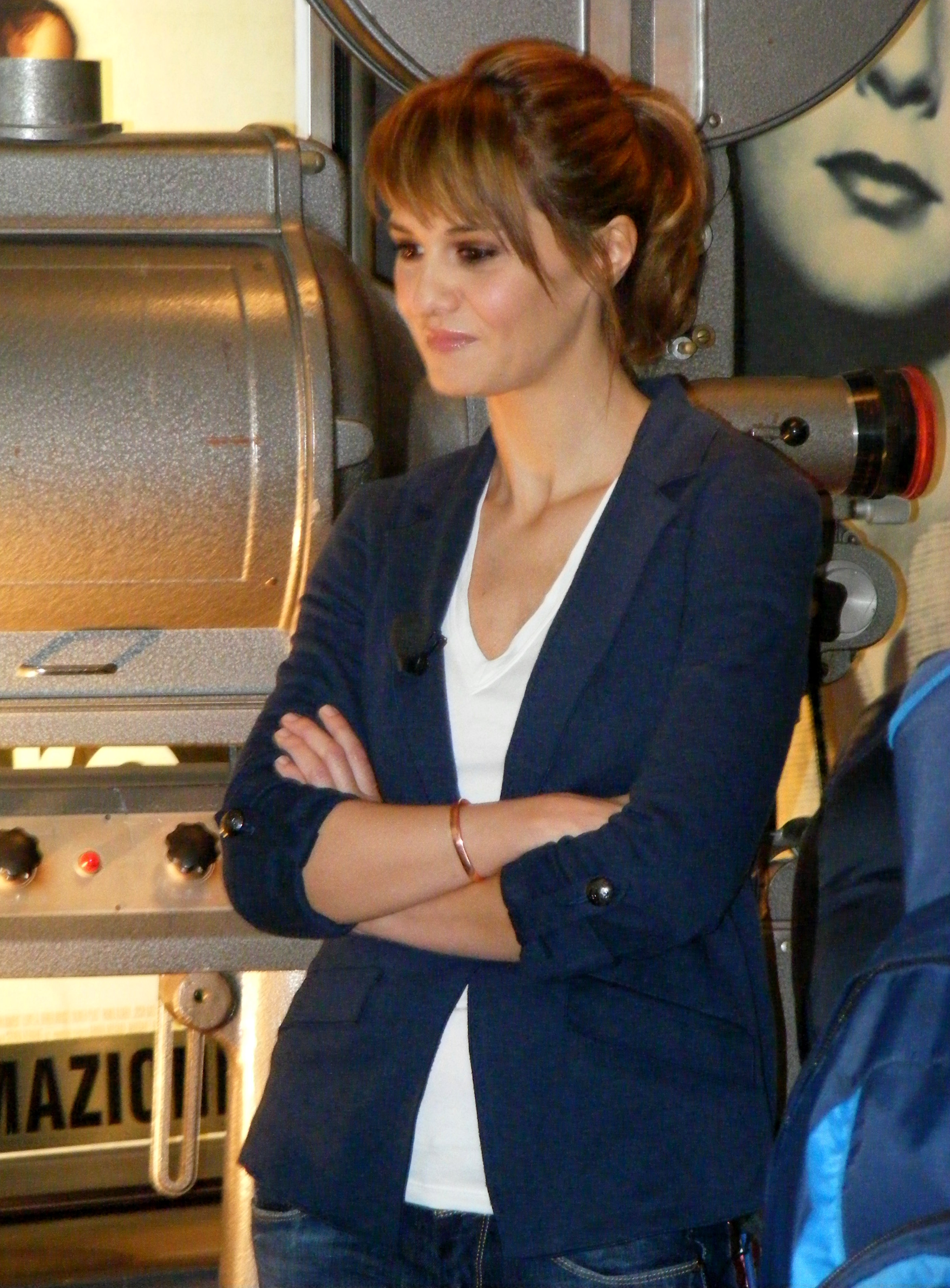 Foto scattata l'11 marzo 2011 al Cinema Adriano (Roma). Photo by Cannibal0905